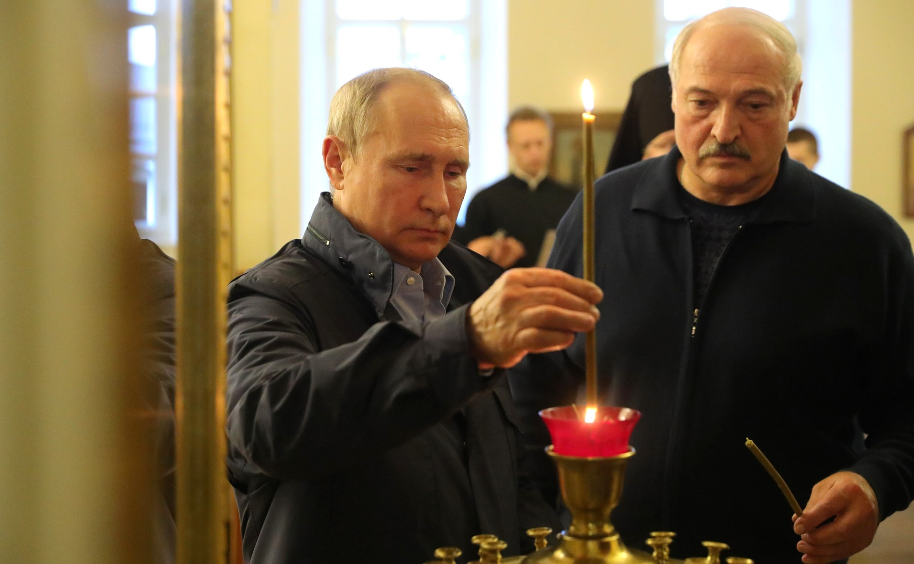 Владимир Путин и Президент Республики Беларусь Александр Лукашенко посетили Коневский Рождество-Богородичный монастырь